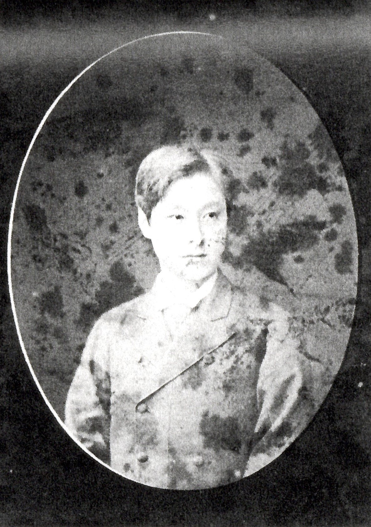 田村崇顕の肖像写真。